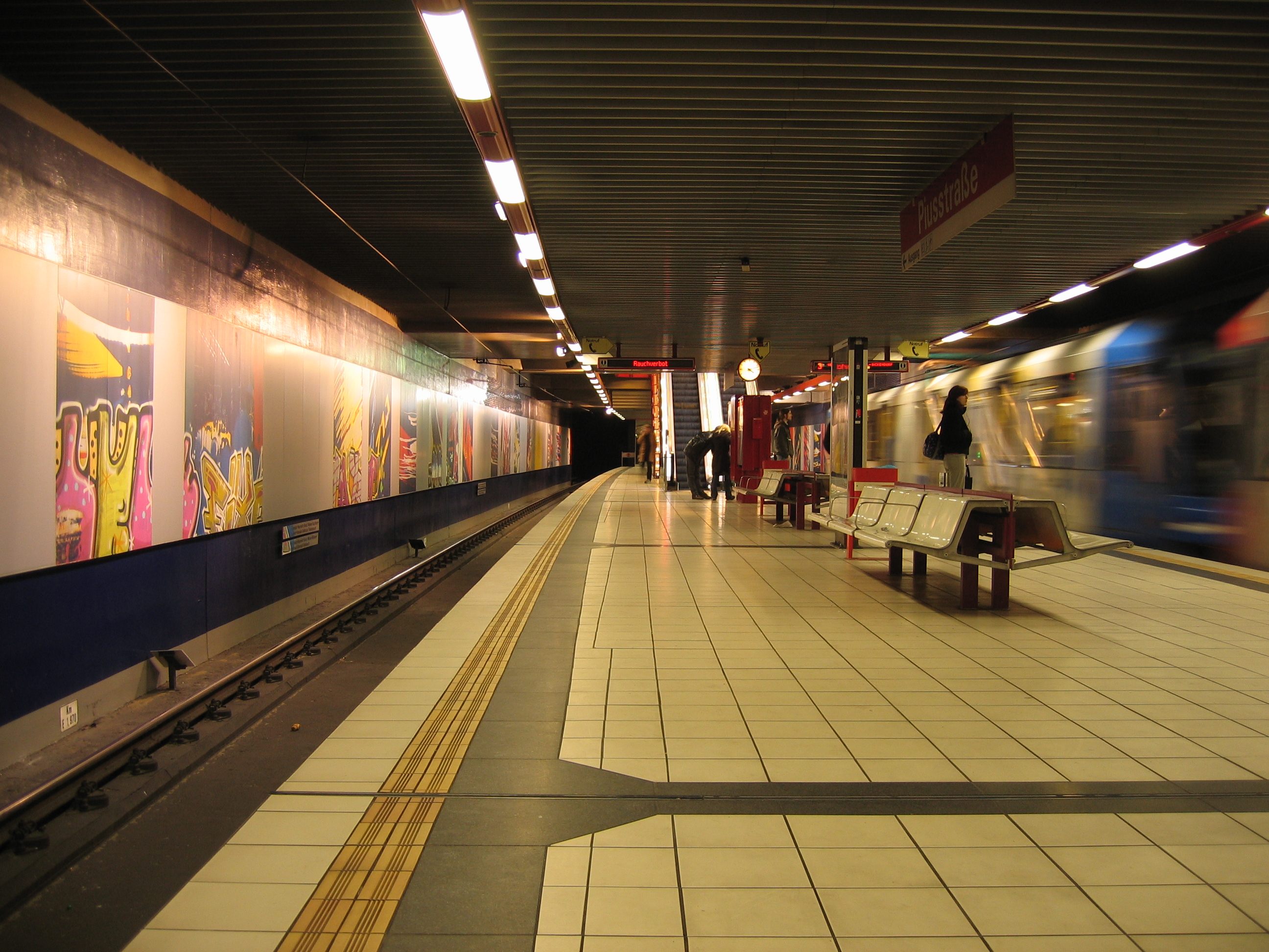 U-Bahn-Station Piusstraße der Stadtbahn Köln